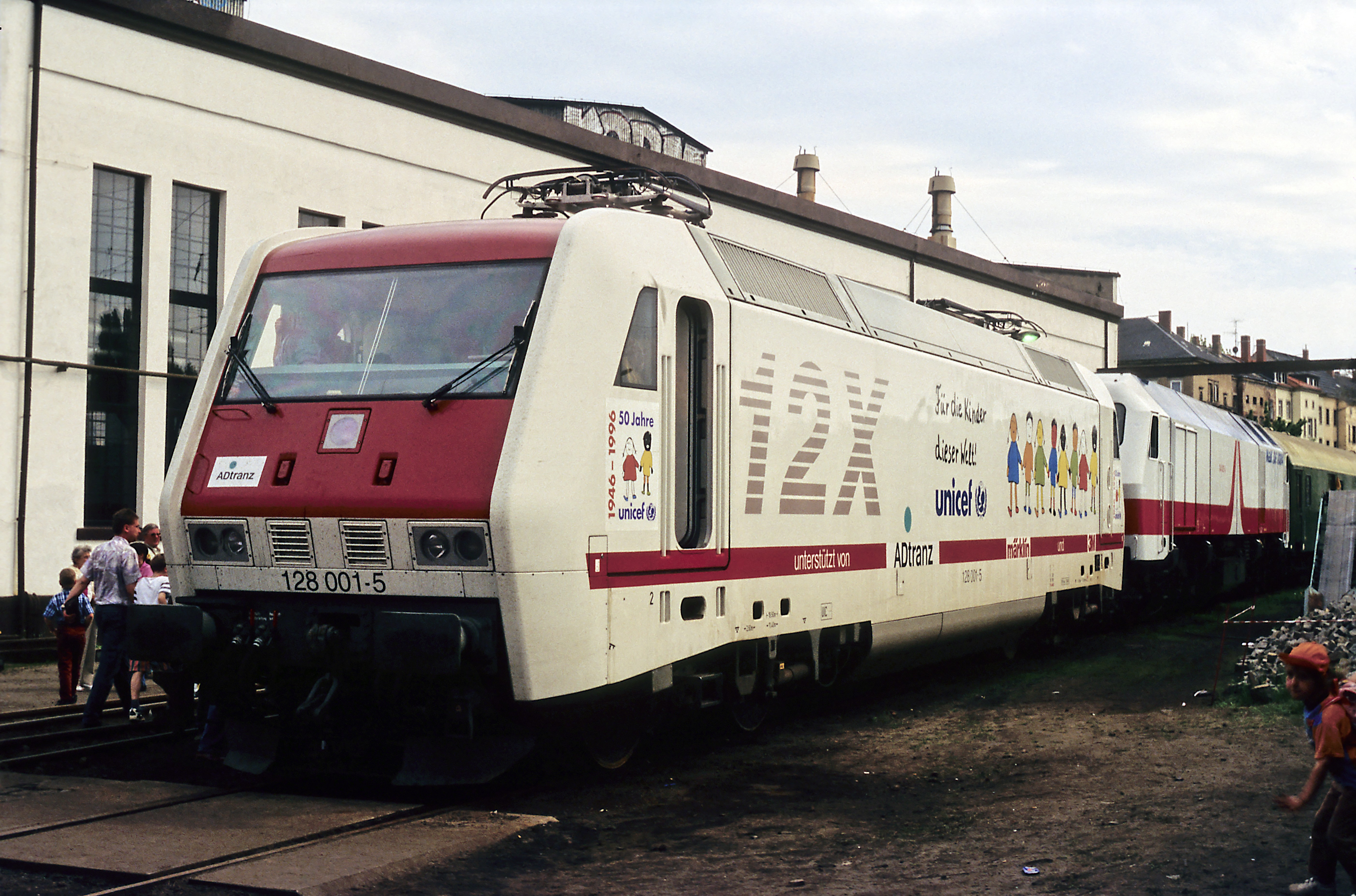 AEG-Prototyp einer schnelllaufenden Hochleistungslokomotive, zum Aufnahmezeitpunkt beim Dresdener Dampflokfest 1996 ist die Lokomotive zwei Jahre alt und noch mit der ursprünglichen elektrischen Ausrüstung versehen. Die Herstellerbezeichnung 12X entstand, weil man davon ausging, dass die Lokomotive eine Reihenbezeichnung zwischen 121 und 129 erhalten würde. Eine Serienlieferung folgte nie, doch zahlreiche Teile und konstruktive Details wurden bei den Lokomotiven der Plattform Bombardier TRAXX übernommen.